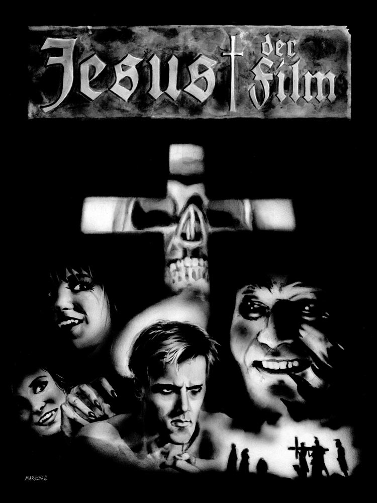 Plakat zu JESUS - DER FILM